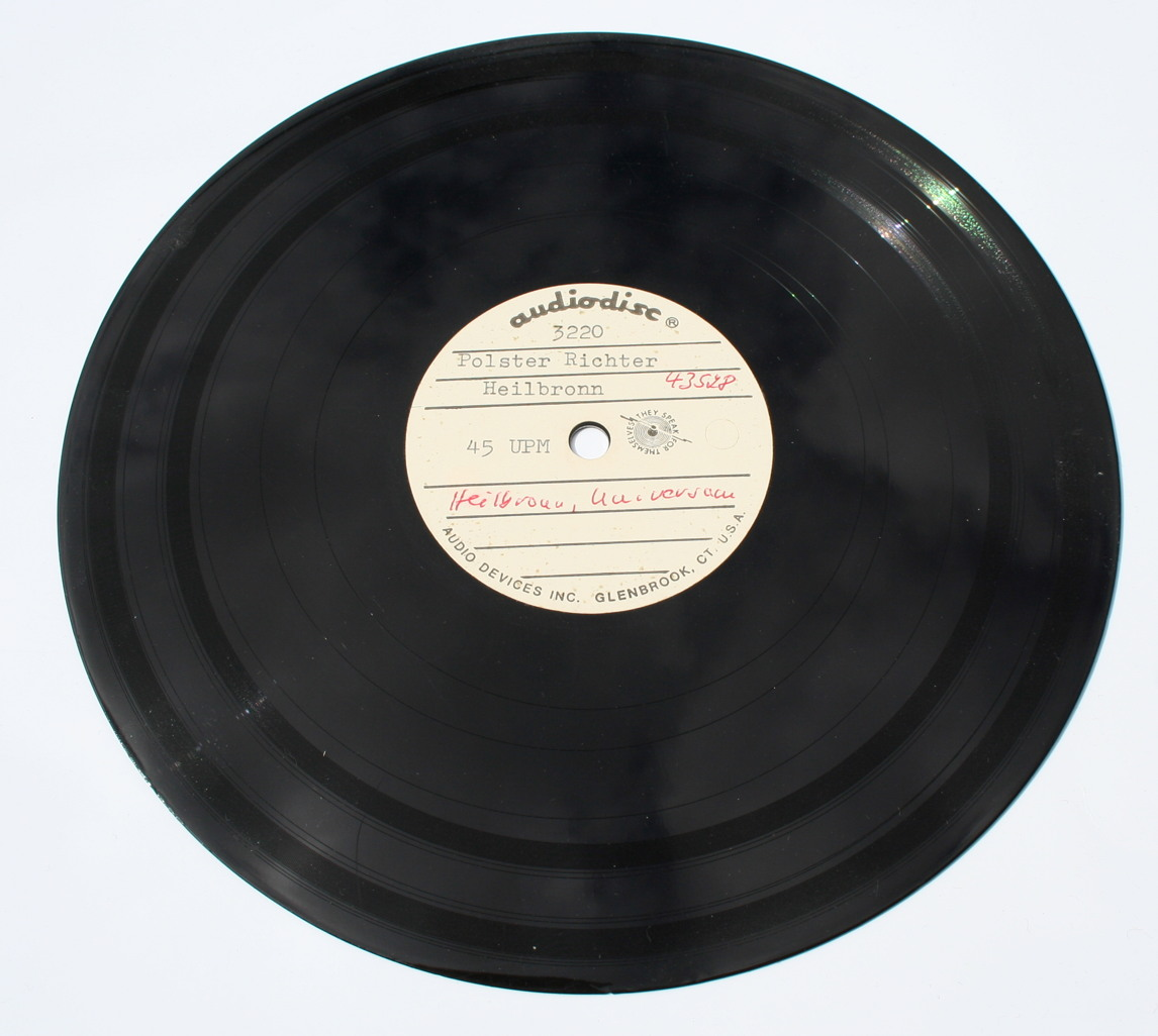 Schallplatte mit Ton für Werbedia im Kino